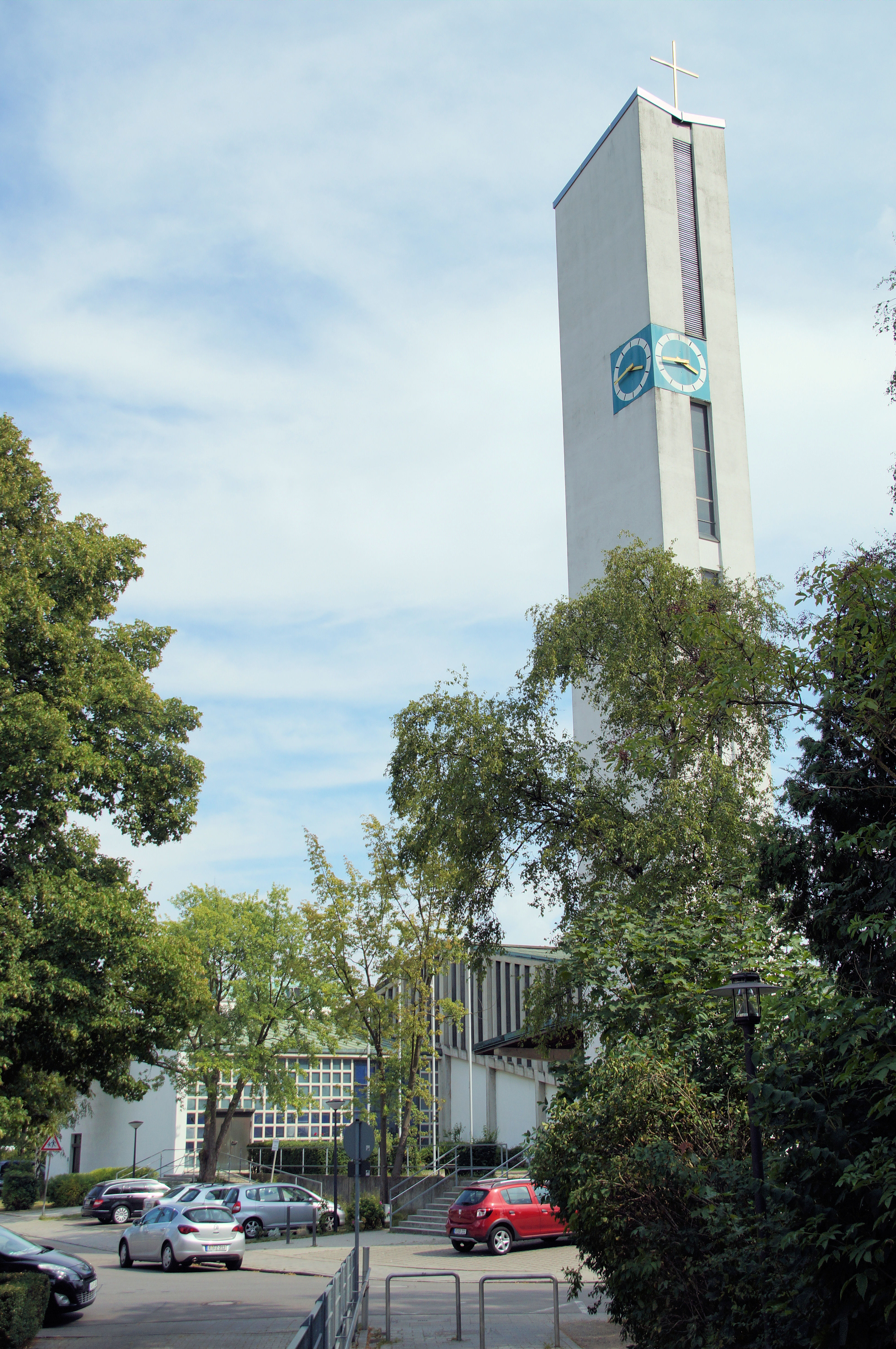 Kath. Herz Marien Kirche in der Rilkestraße, Regensburg